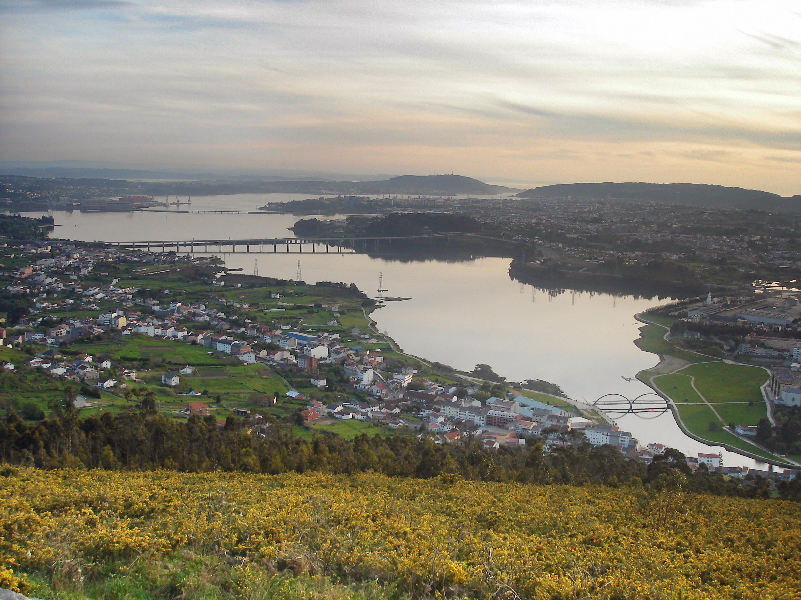 Ría de Ferrol desde o Coto de Ancos. Pódese observar os concellos de Ares, Fene, Ferrol, Mugardos,Narón e Neda.